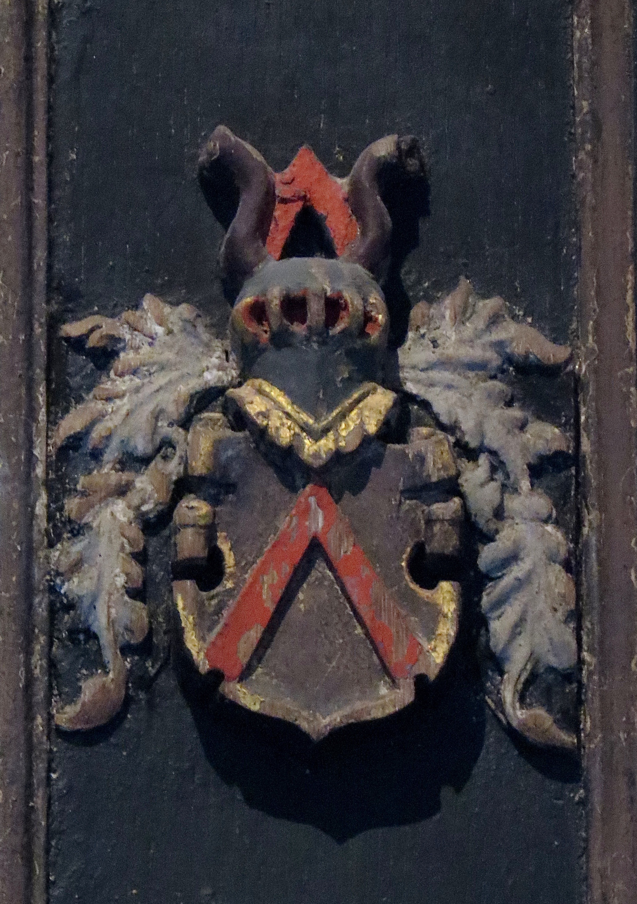 Sparres våben, fra Gjørvel Fadersdatter Sparre (1517-1605) - og Lave Brahes (1500-1567) epitafium, oprindeligt placeret i Lunds Domkirke, nu i Historisk Museum i Lund, Sverige